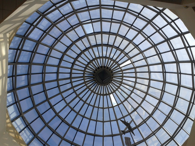 Мектебіміздің төбесі